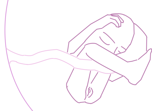 Ventesima settimana di gravidanza